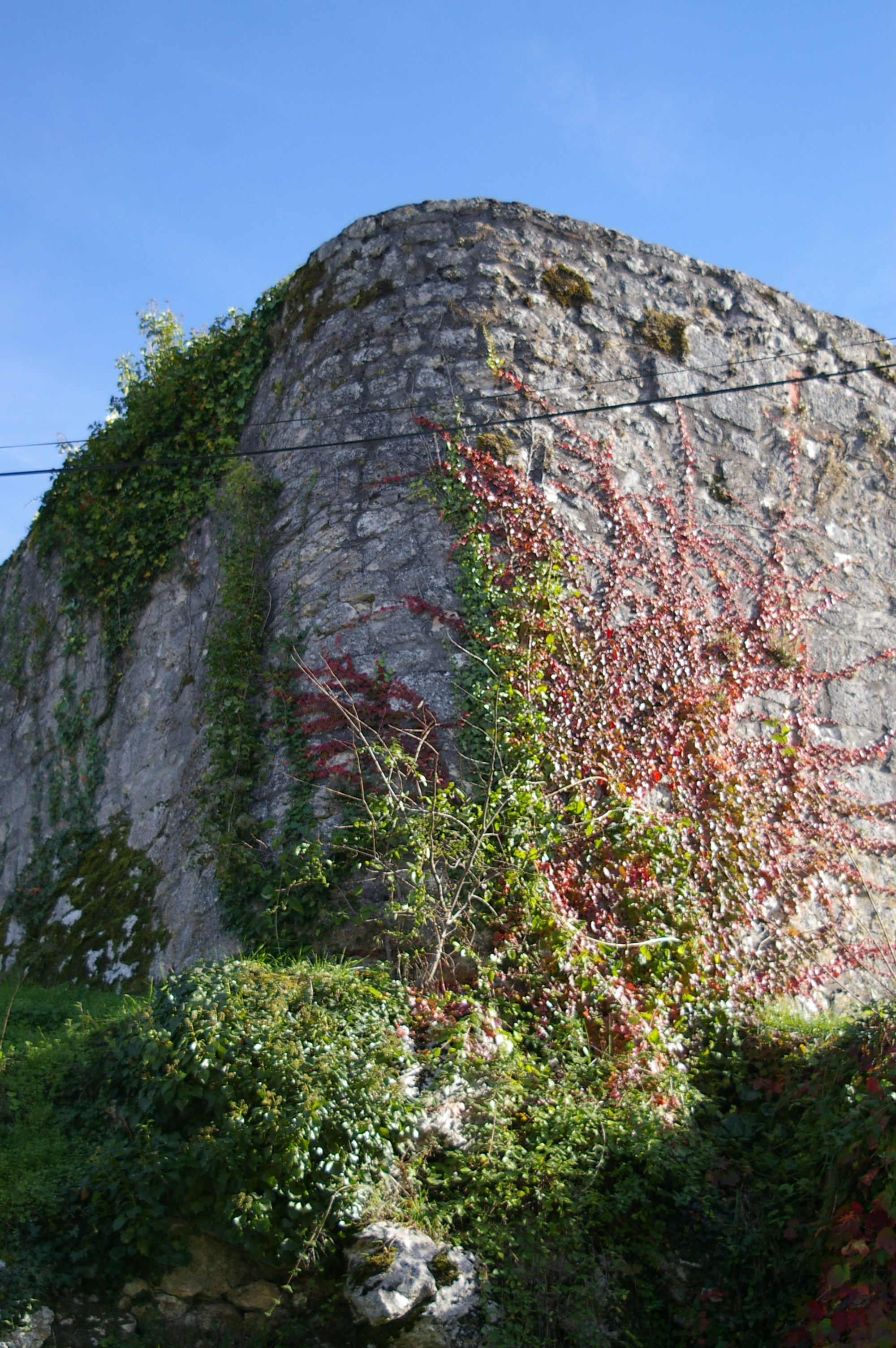 Remparts de Soumensac angle sud-ouest Date de prise de vue novembre 2006 Auteur Annie Collin